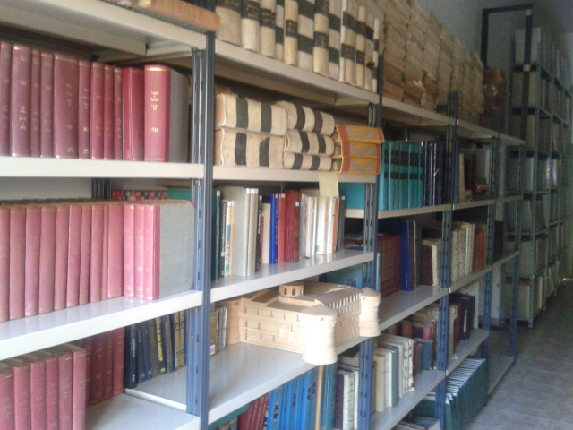 Interno ASCA (Archivio Storico Comunale Avezzano)